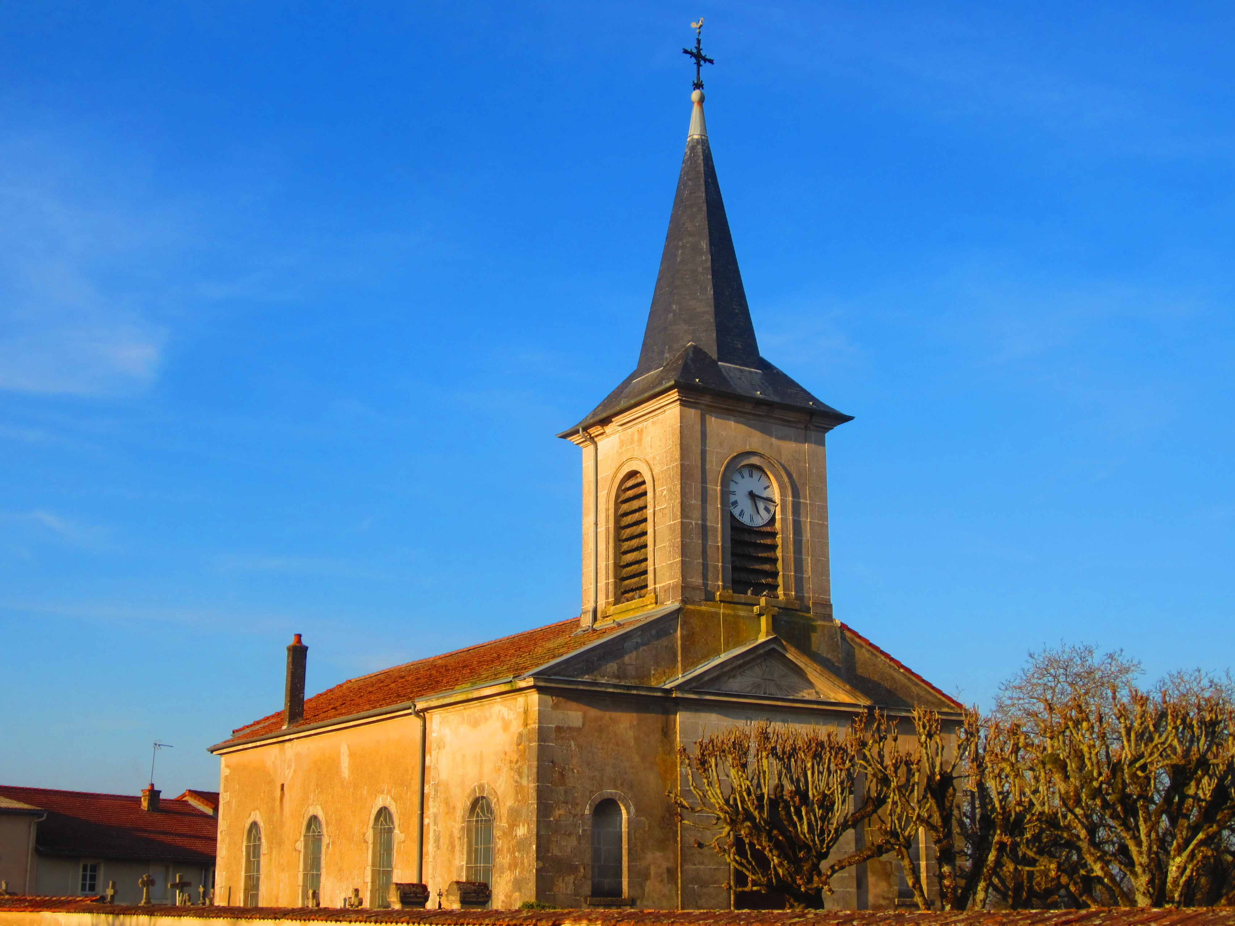 Billy Cotes eglise